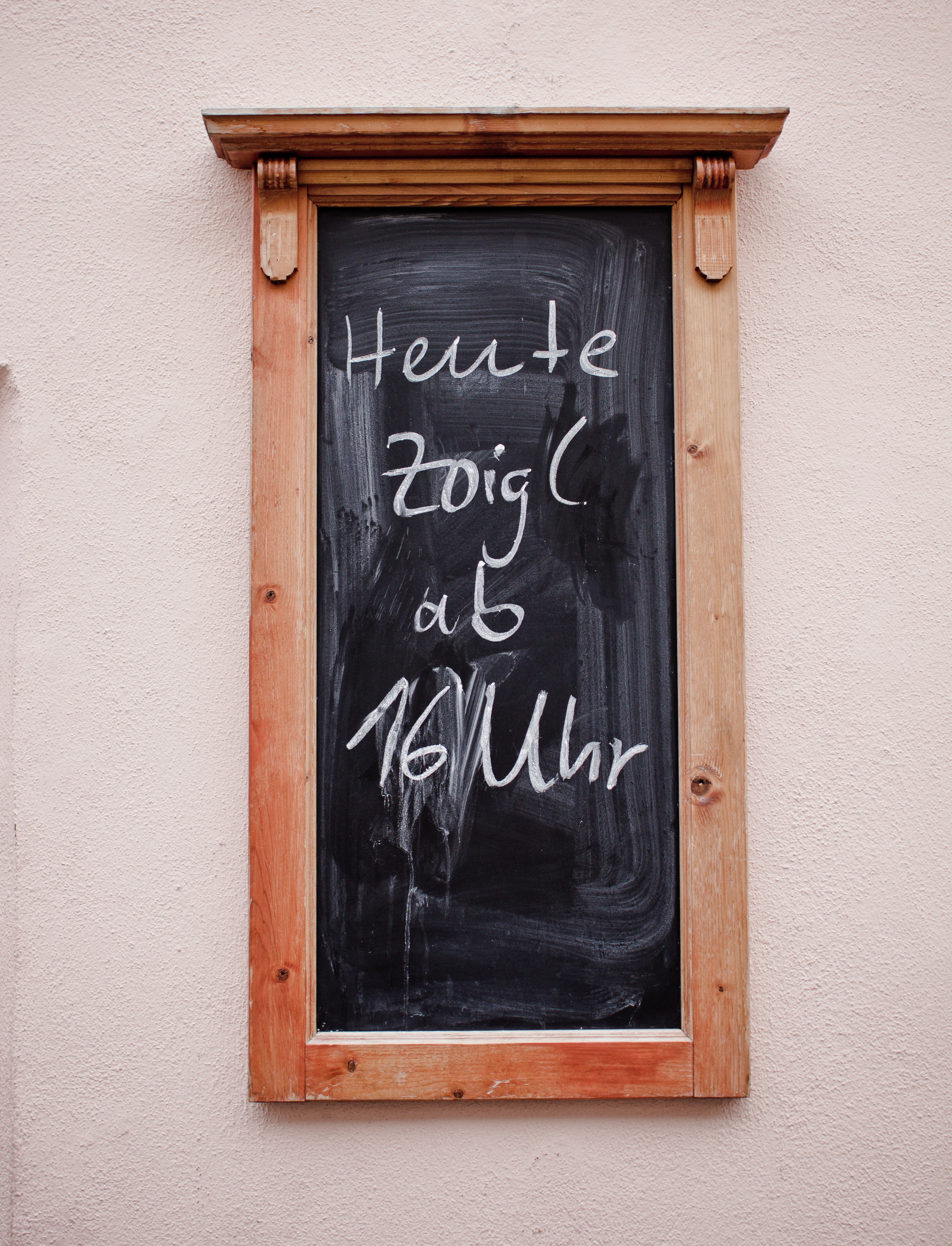 Zoigl-Ausschank Kaufbeuren, Werbeschild. anlässlich Glamwiki-Treffen Kaufbeuren